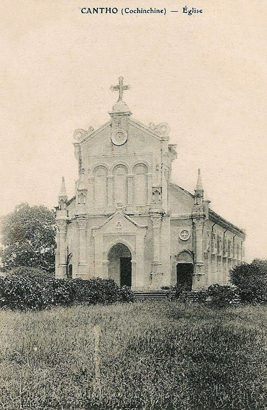 Nhà thờ Cần Thơ đầu thế kỷ XX